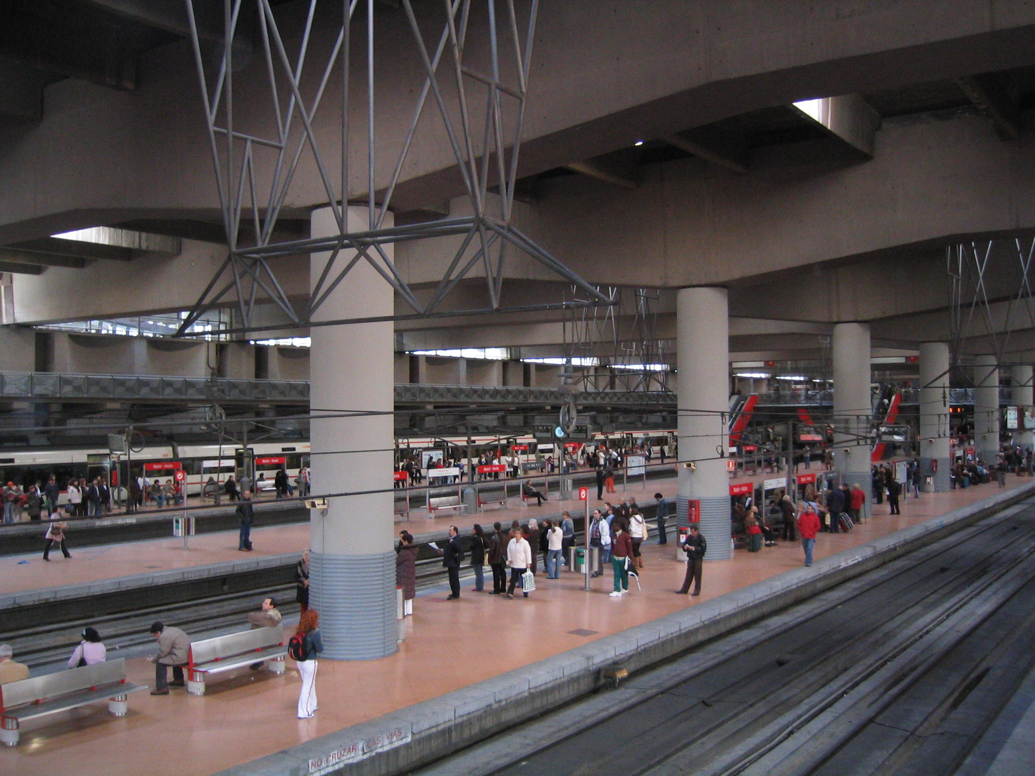 Estación de tren de Atocha (Madrid, España), andenes de cercanías, regionales y media distancia en ancho ibérico.